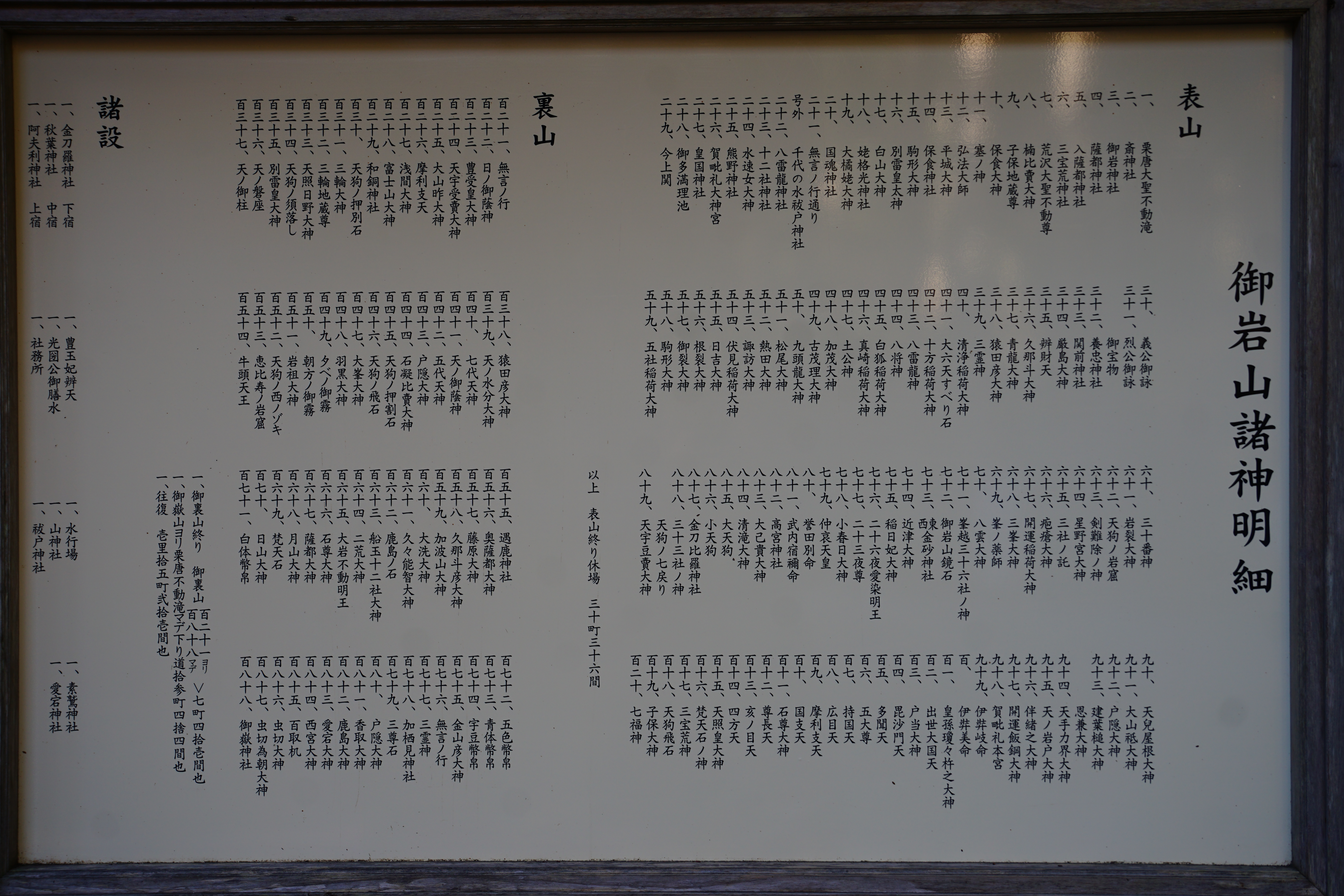 御岩山神社に祀られている神の表